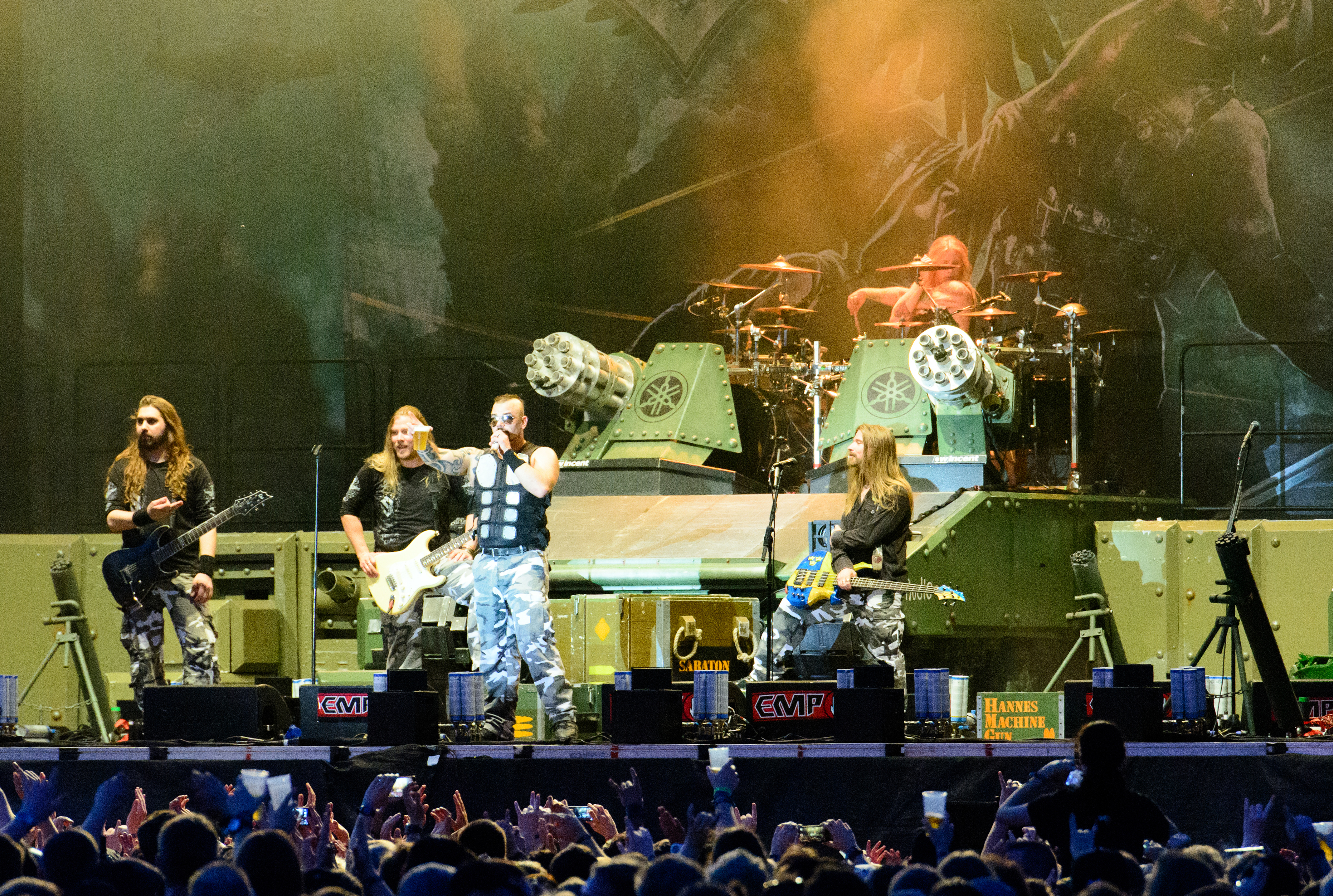 Sabaton beim Elbriot 2016